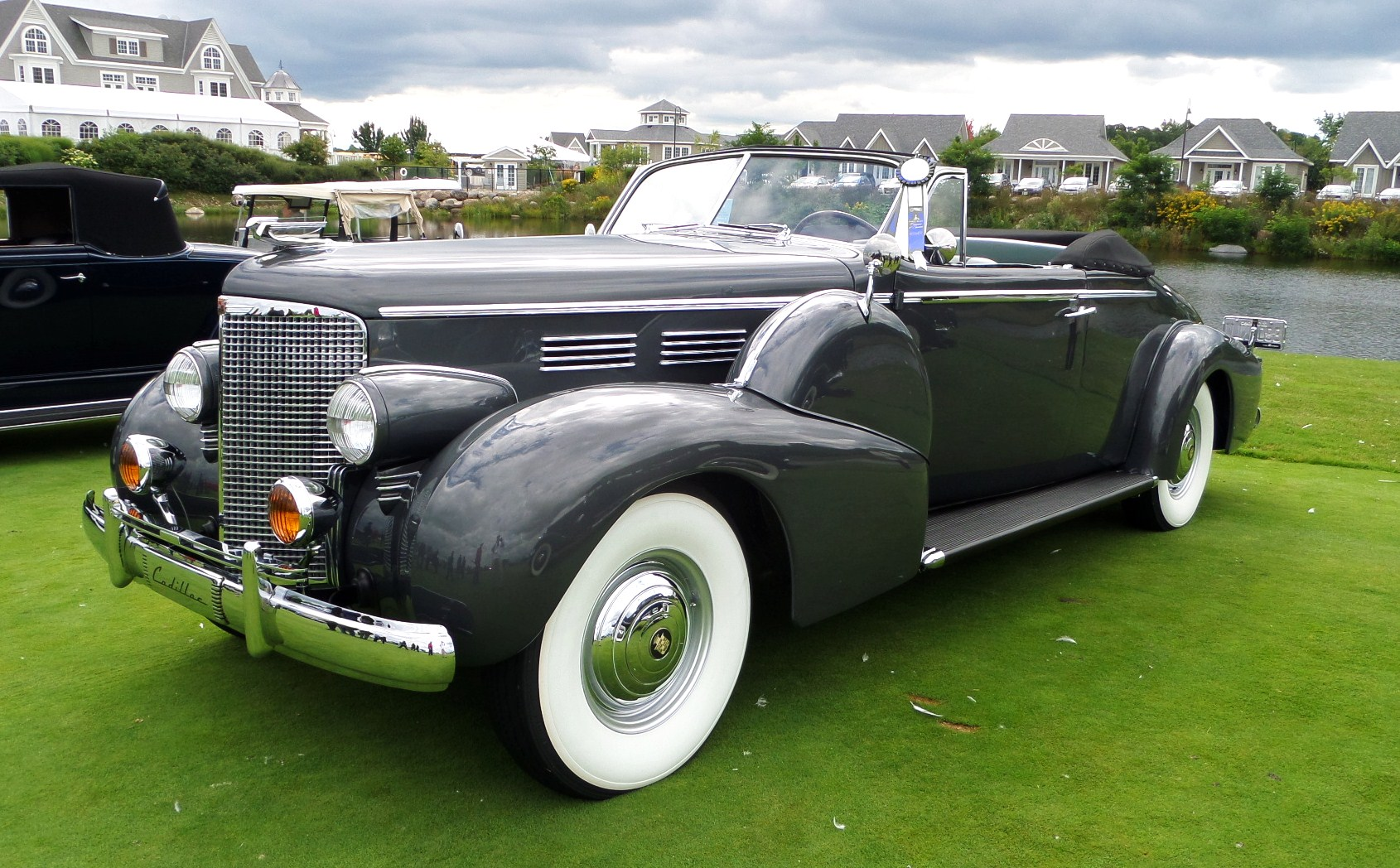 1938 Cadillac V16 series 90 2-door convertible